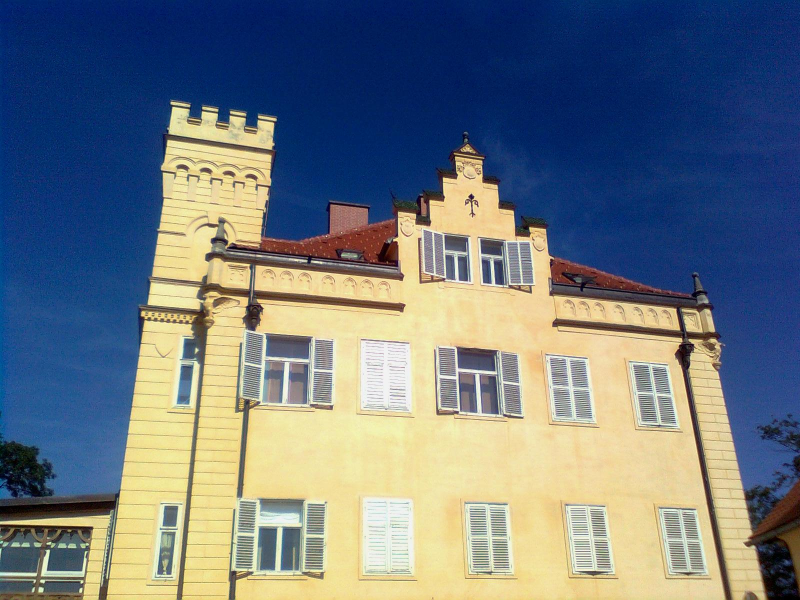 Schloss Lustbühel in Graz